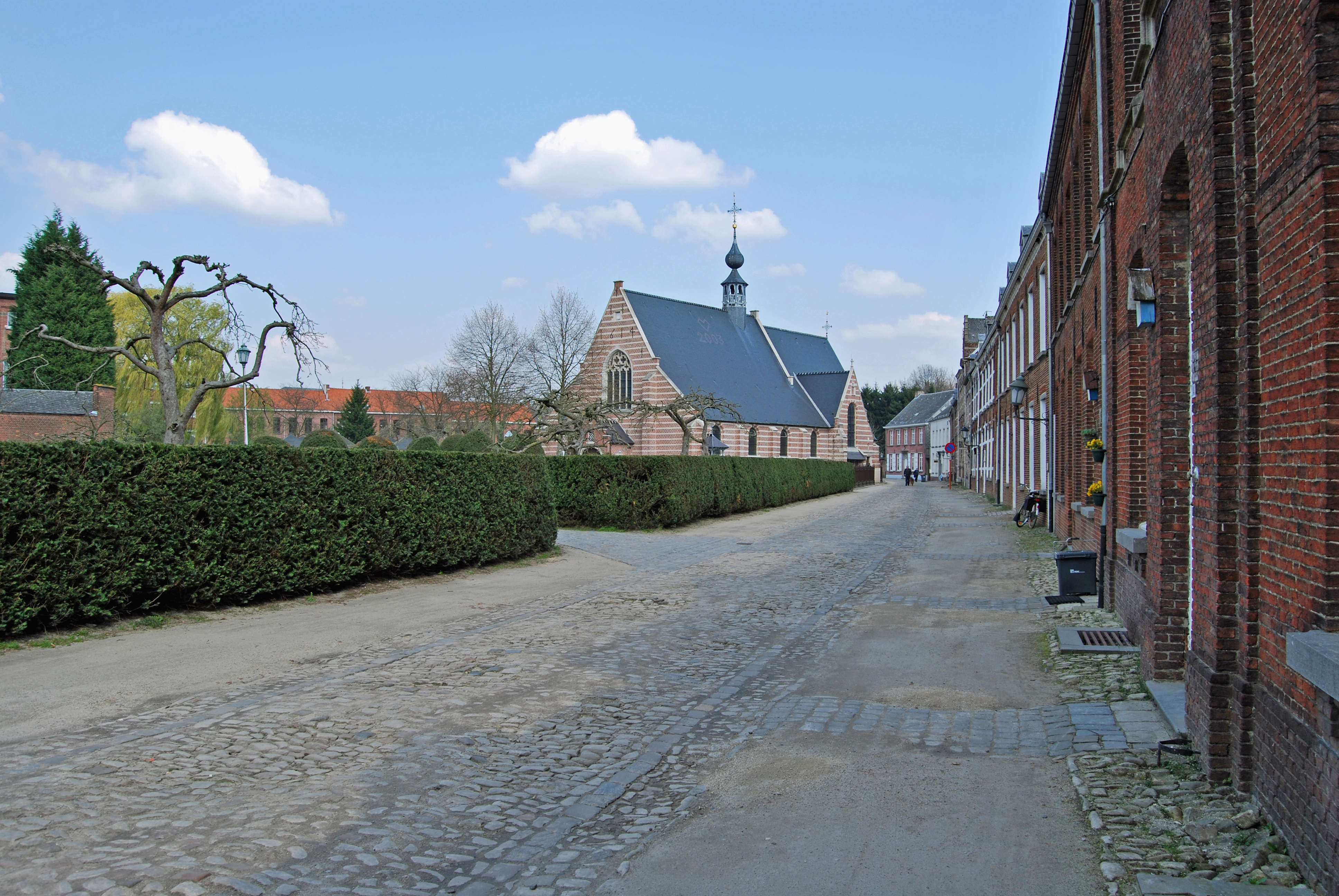 Sint-Katharinakerk van het Begijnhof